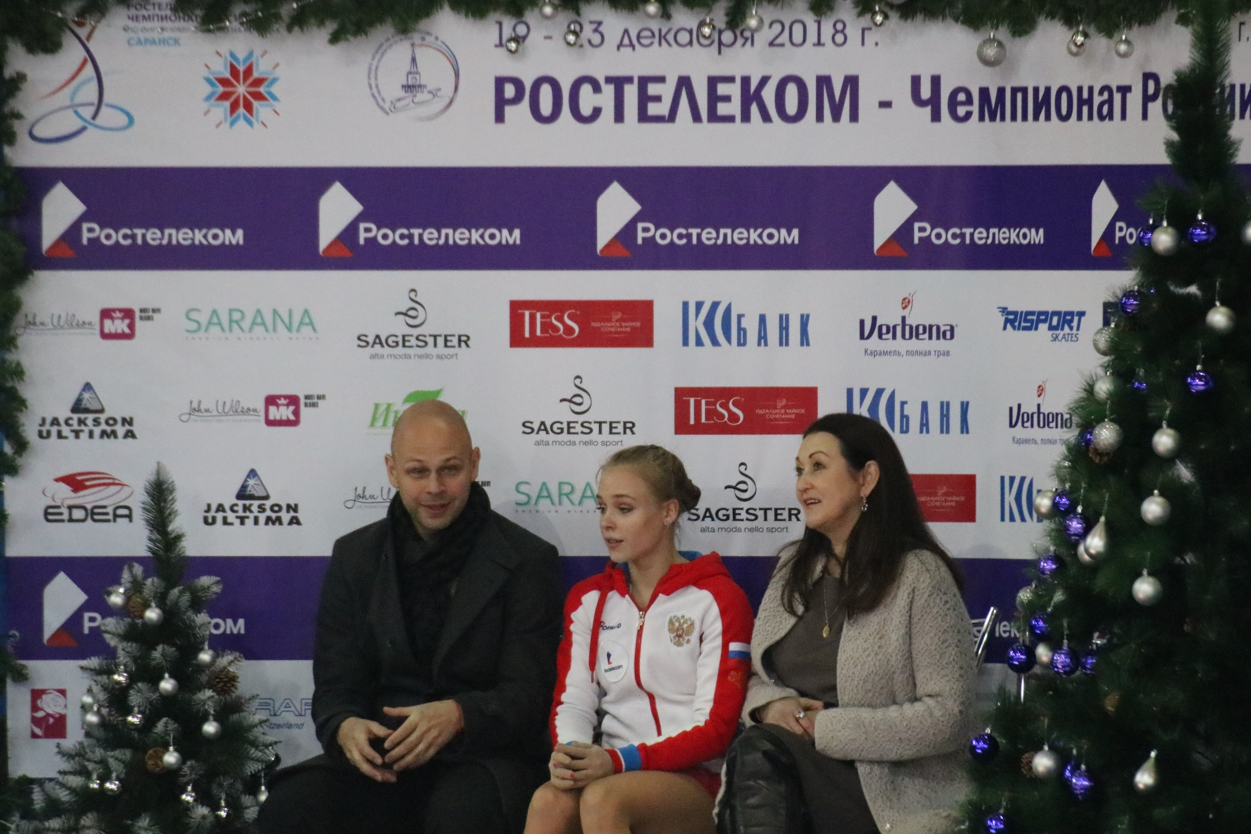 Анастасия Губанова с тренерами Максимом Завозиным и Ириной Тагаевой на чемпионате России по фигурному катанию на коньках 2019